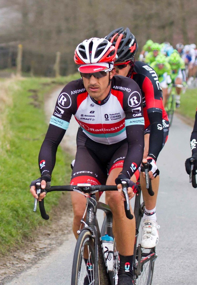 011 cancellara boasson hagen kapelberg